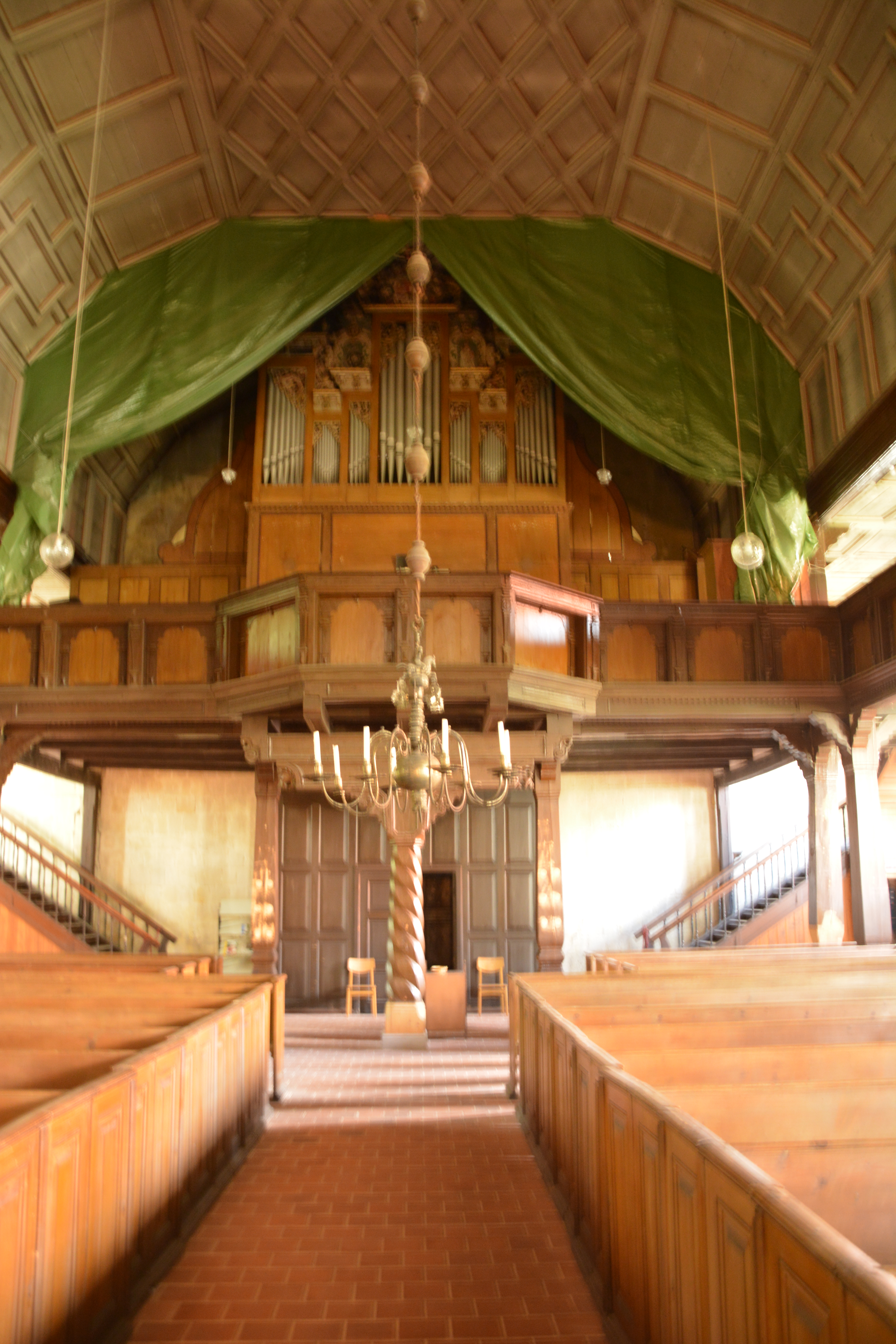 Innenansicht St. Johannis Halberstadt Blick West